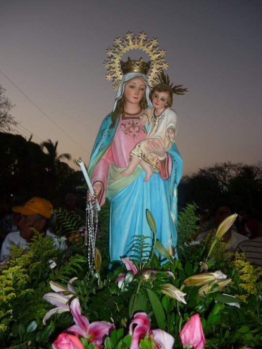 Nuestra Señora de La Candelaria Conmemorada Cada Año el 2 de Febrero.